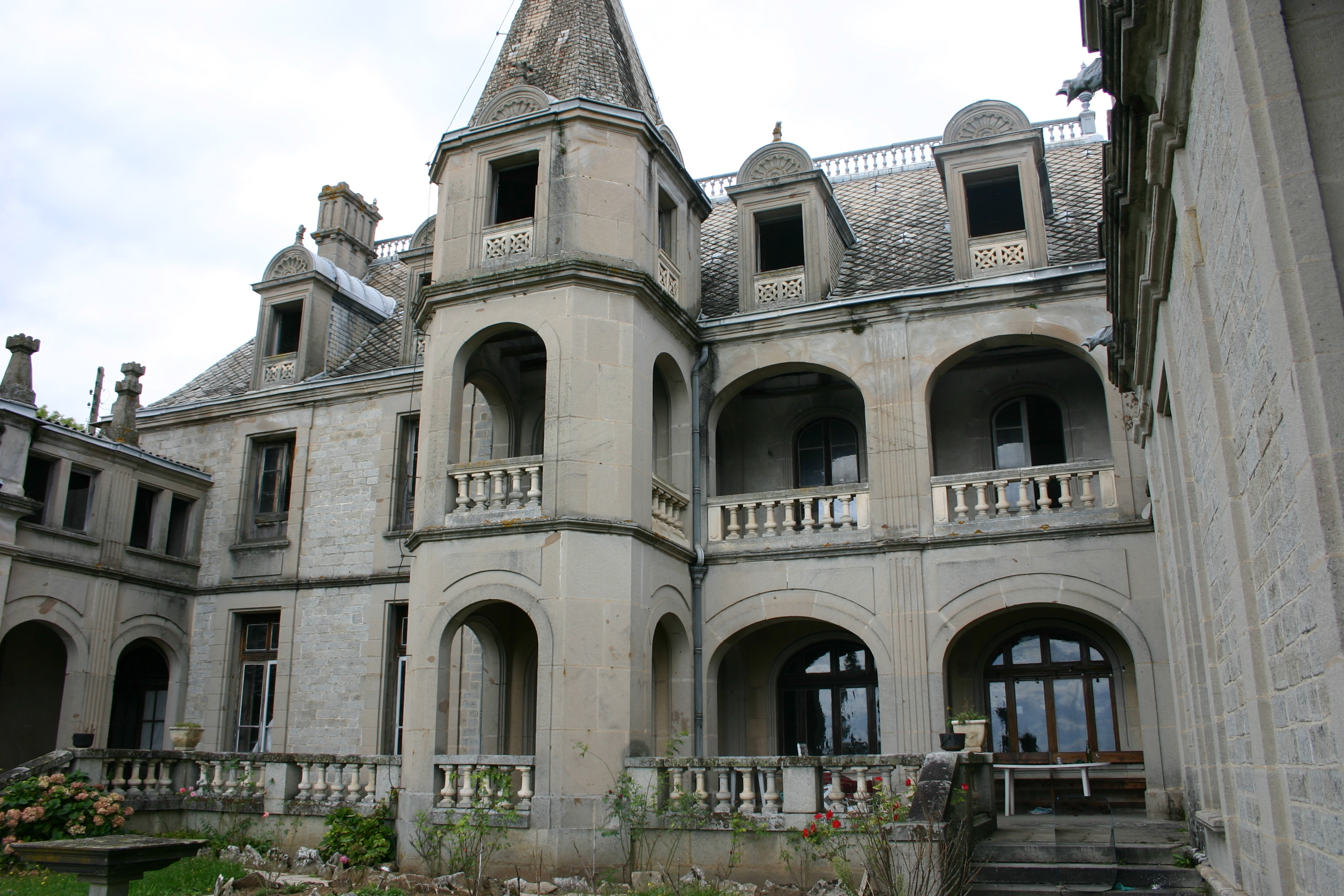 Le château de la Côte sur la commune de Bussières dans le département de la Loire.